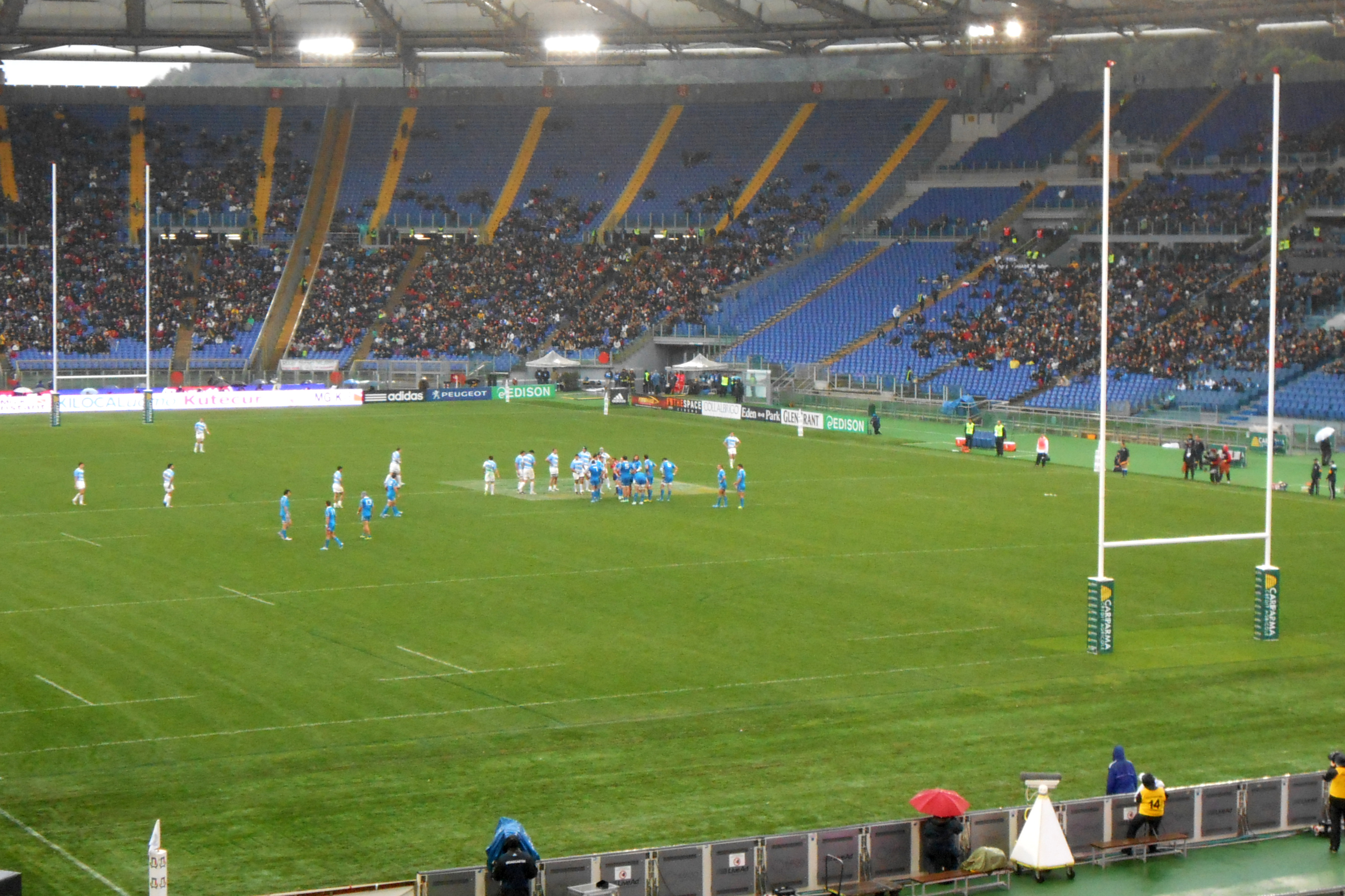 L'incontro amichevole tra Italia e Argentina allo stadio Olimpico